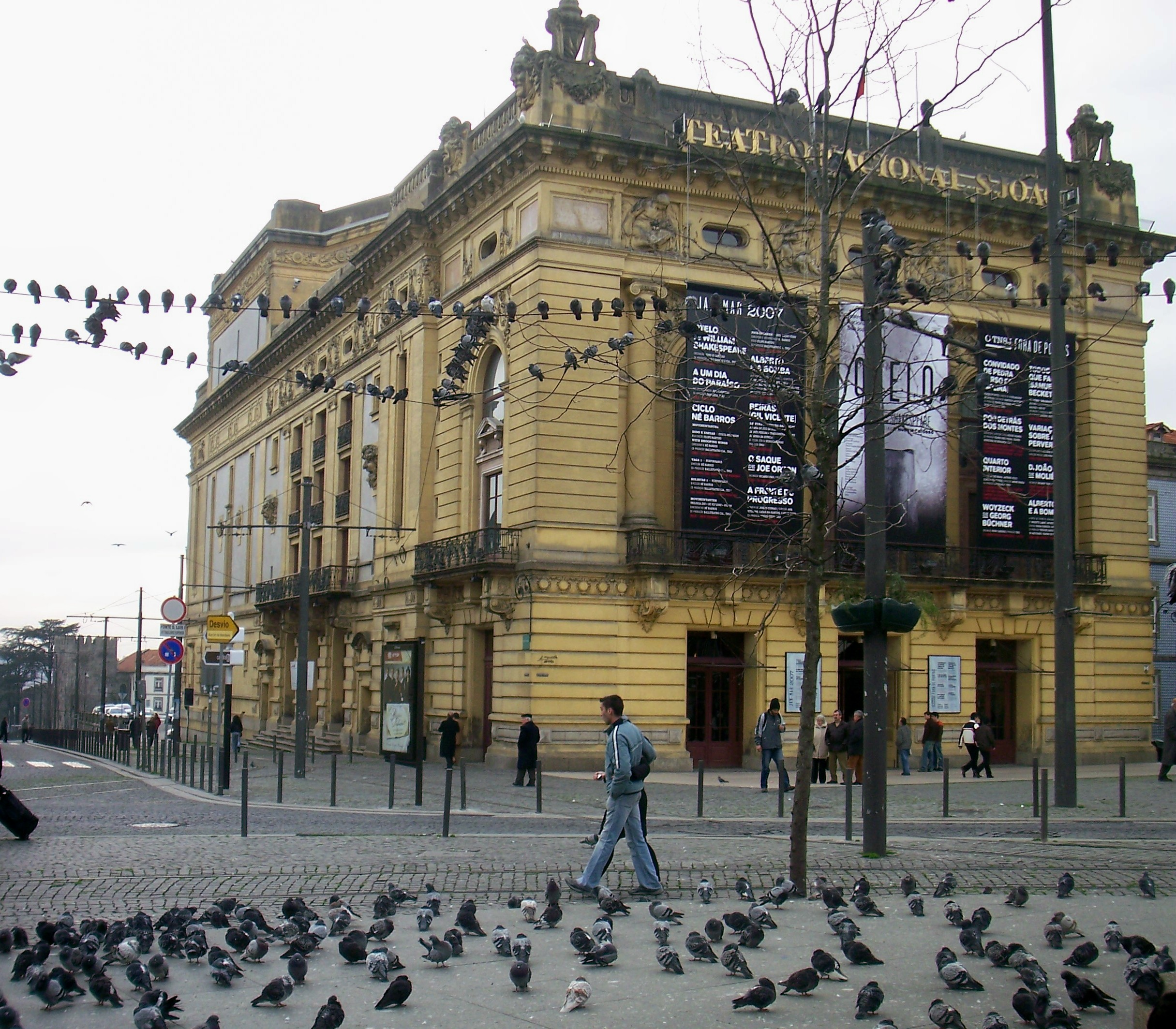 Porto